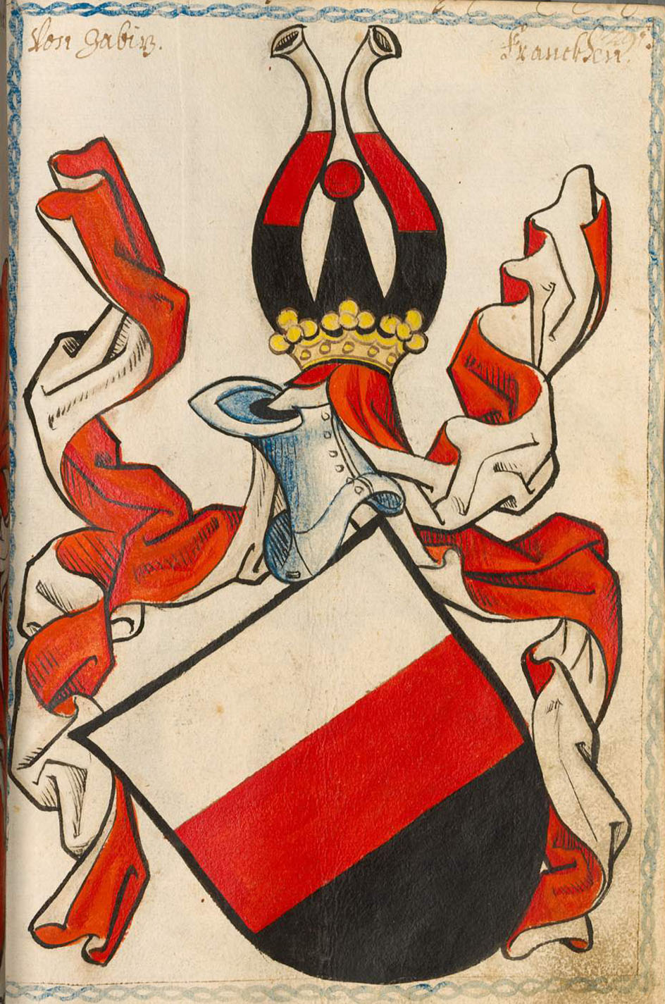 Scheibler'sches Wappenbuch , älterer Teil Zedwitz